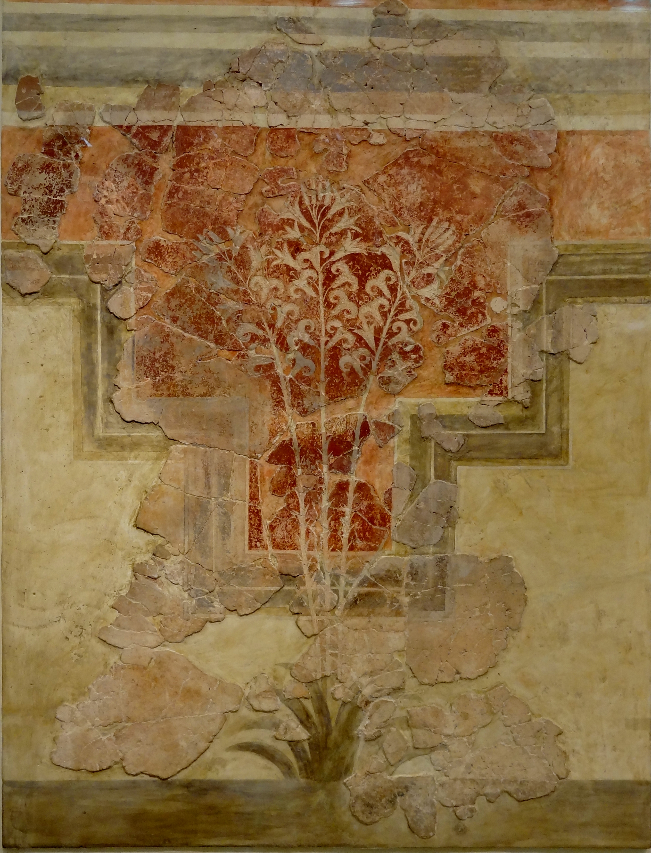 Weiße Lilien im Blumengarten, Fresko aus der „Villa der Lilien“ in Amnissos (1600–1500 v. Chr.), ausgestellt im Archäologischen Museum Iraklio, Kreta, Griechenland